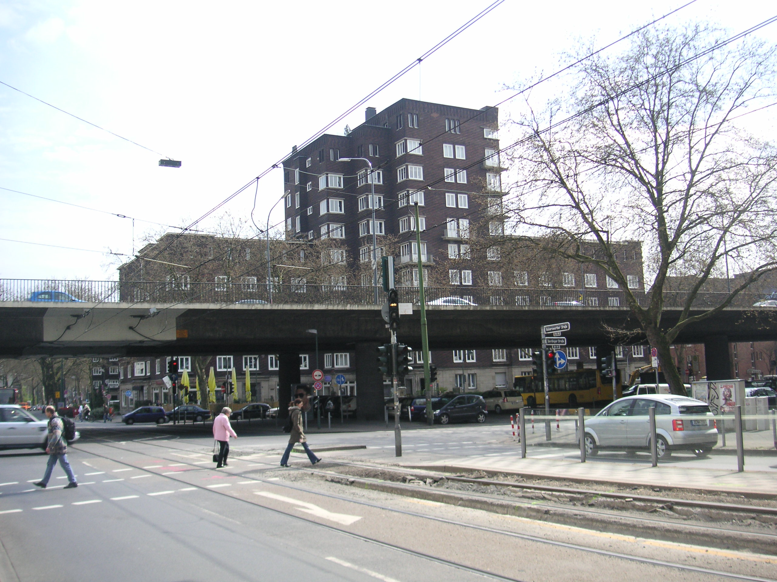 Kaiserswerther Straße / Uerdinger Straße im Vordergrund Theodor-Heuss-Brücke